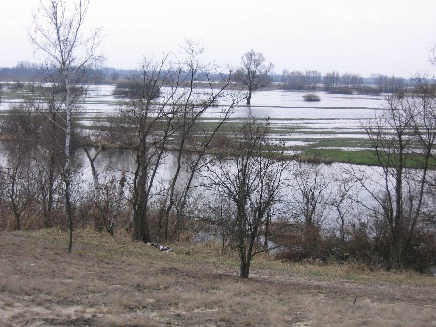 Dolina Rzeki Warty - okolice wsi gminnej Lą…dek, wysoki stan wody, marcowe roztopy. (foto: Paulina Ratajczak)